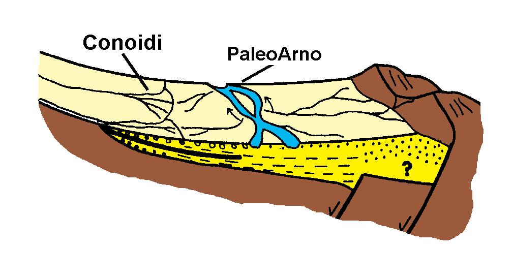 Colmamento del bacino con sviluppo di conoidi alluvionali e di corsi d’acqua che scorrevano in direzione O-E